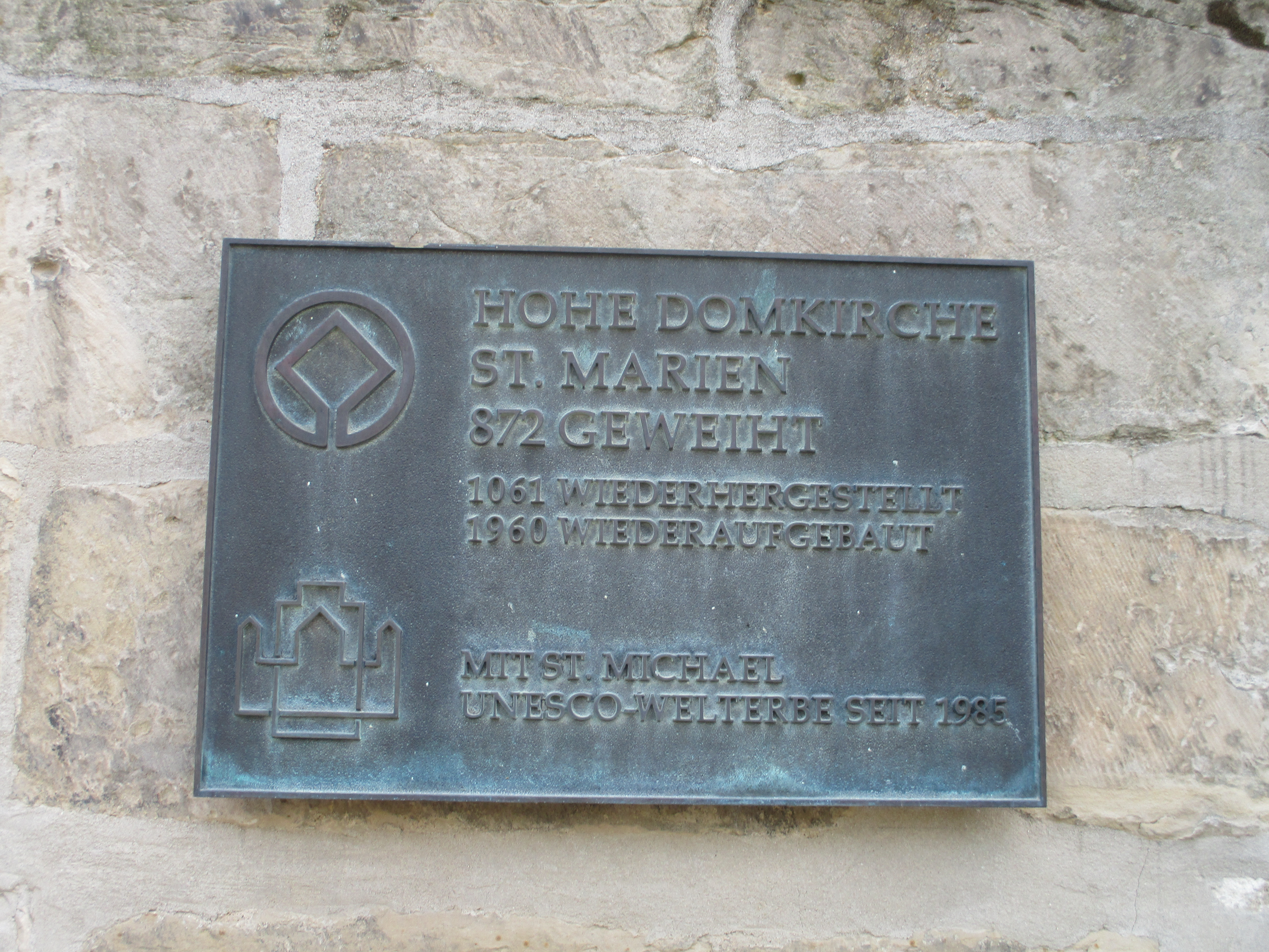 Hildesheimer Dom: Unesco-Plakette am Nordwestportal des Domes.